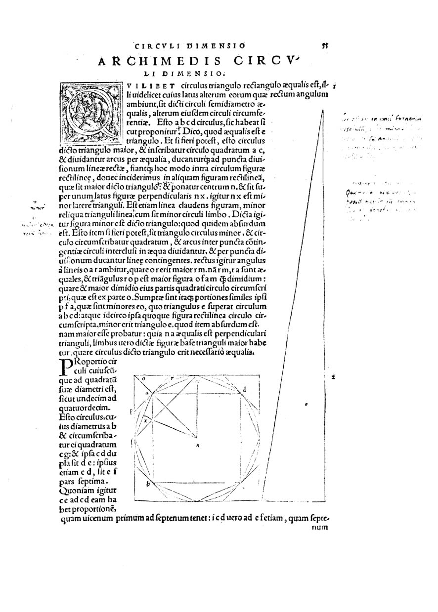 Archimedous tou Syrakousiou ta mechri nyn sozomena, hapanta. Archimedis Syracusani ... Opera, quae quidem extant, omnia, ... primum & Graece & Latine in lucem edita. ... Adiecta quoque sunt Eutocii Ascalonitae in eosdem Archimedis libros commentaria, item Graece & Latine, numquam antea excusa. - Basileae : Ioannes Heruagius excudi fecit, 1544. - 3 parti ([8], 139, [1]; [8], 163 [1]; [4], 65, [3], 68, [4] p.) : ill. ; 2° . Pagina 55 (inizio di Archimedis Circuli dimensio)